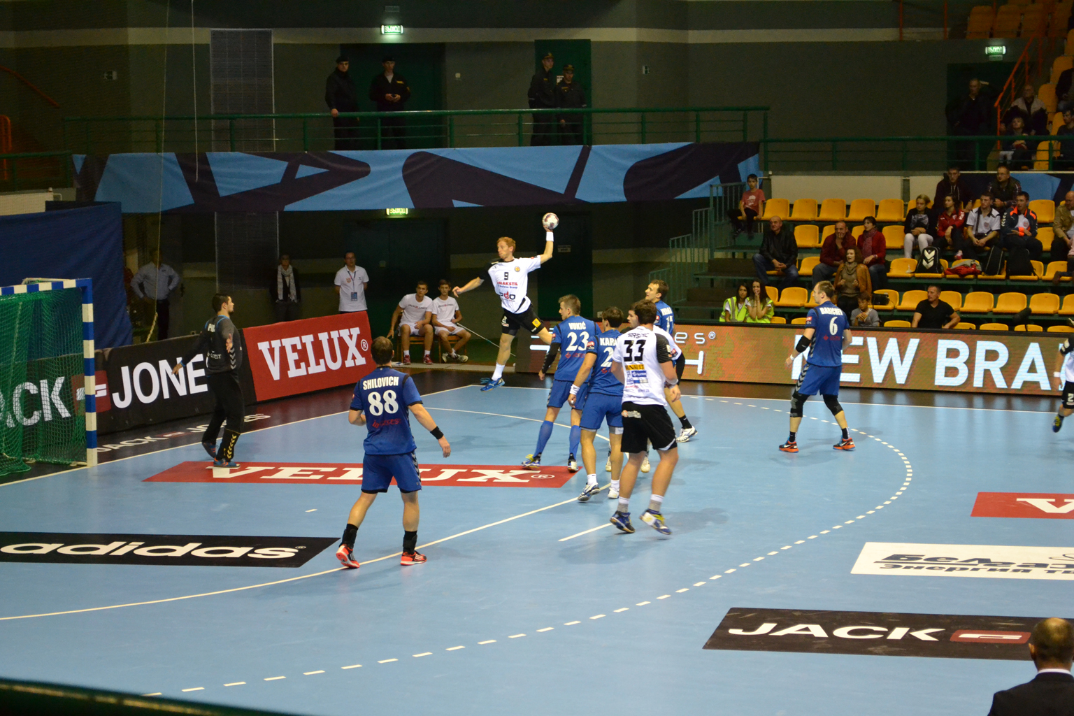 Беларуская (тарашкевіца): Матч Лігі чэмпіёнаў паміж берасьцейскім клюбам «БГК імя Мяшкова» і «Мэталюргам» са Скоп’е.